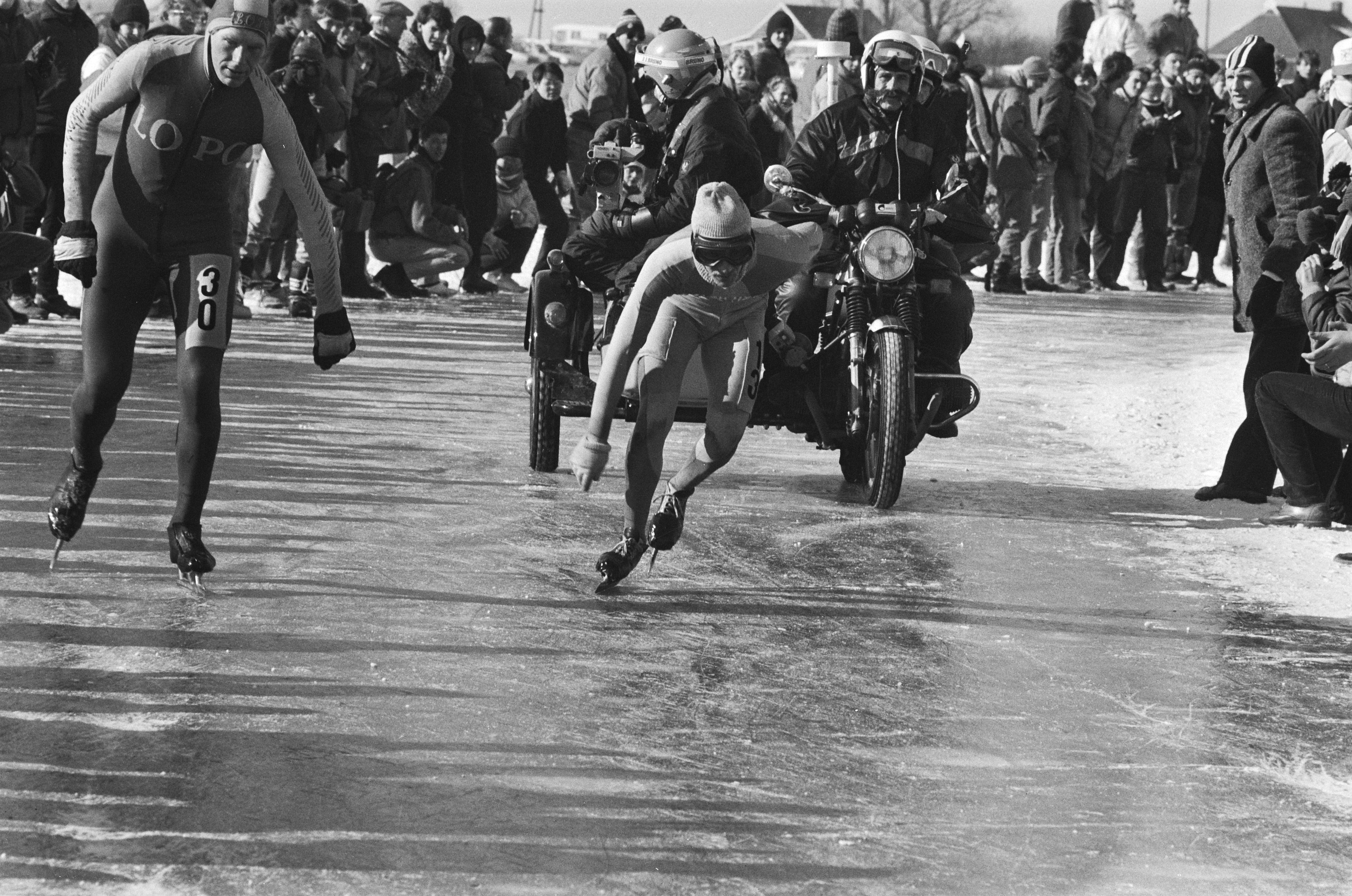 Collectie / Archief : Fotocollectie Anefo Reportage / Serie : Elfstedentocht 1986 Beschrijving : Rein Jonker (nr. 30) kan op weg naar Leeuwarden van Benthem (r.) niet meer volgen (bij Bartlehiem). Datum : 26 februari 1986 Locatie : Friesland Trefwoorden : ijs, marathonschaatsen, motorfietsen, publiek, wedstrijden, winter Persoonsnaam : Benthem, Evert van, Jonker, Rein Fotograaf : Bogaerts, Rob / Anefo, [onbekend] Auteursrechthebbende : Nationaal Archief Materiaalsoort : Negatief (zwart/wit) Nummer archiefinventaris : bekijk toegang 2.24.01.05 Bestanddeelnummer : 933-5795